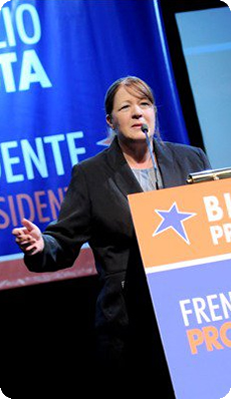 Foto de Margarita Stolbizer en acto.